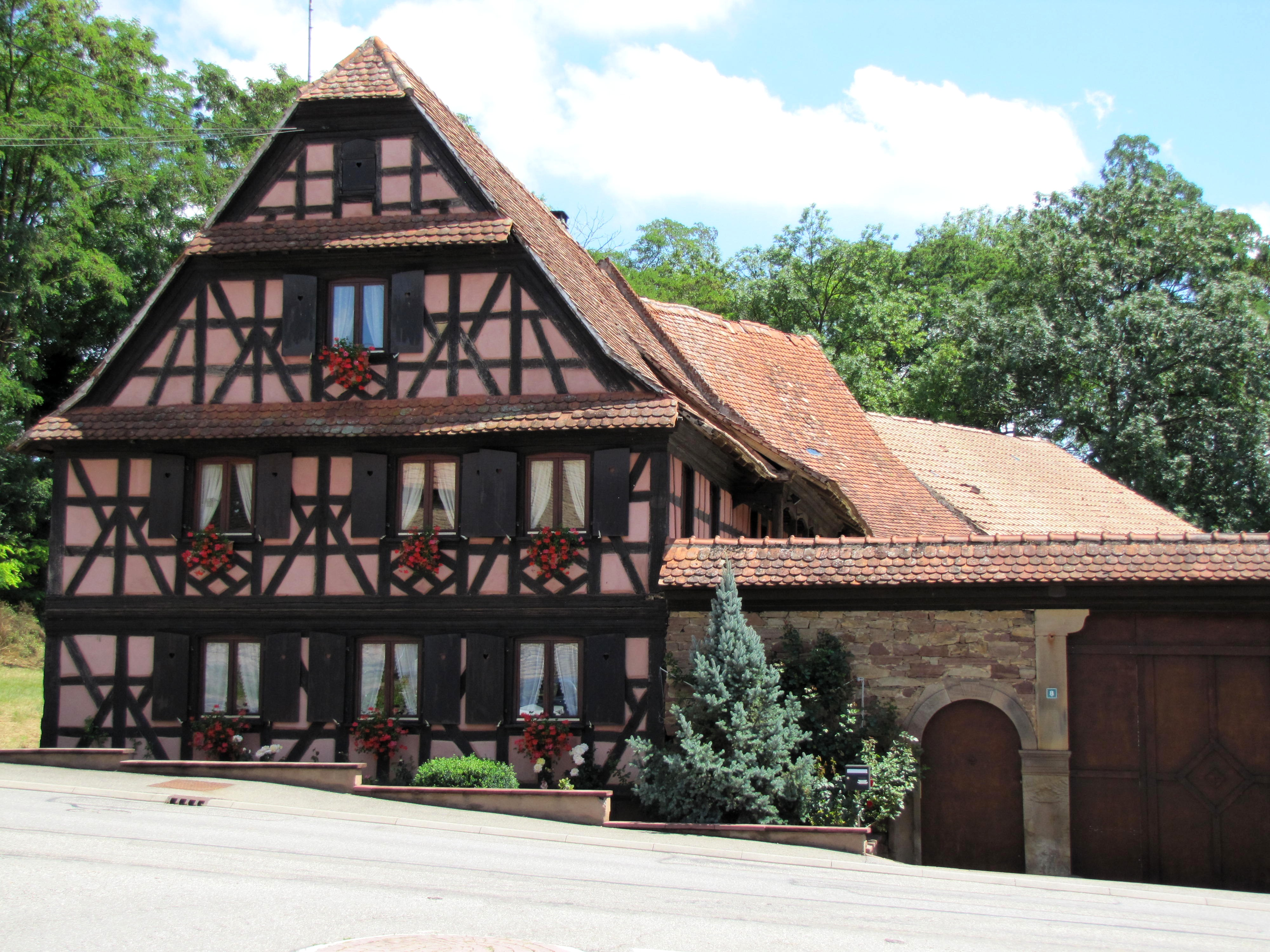 Alsace, Bas-Rhin, Berstett, Reitwiller, Moulin (1790-1875), 8 rue de Strasbourg. .